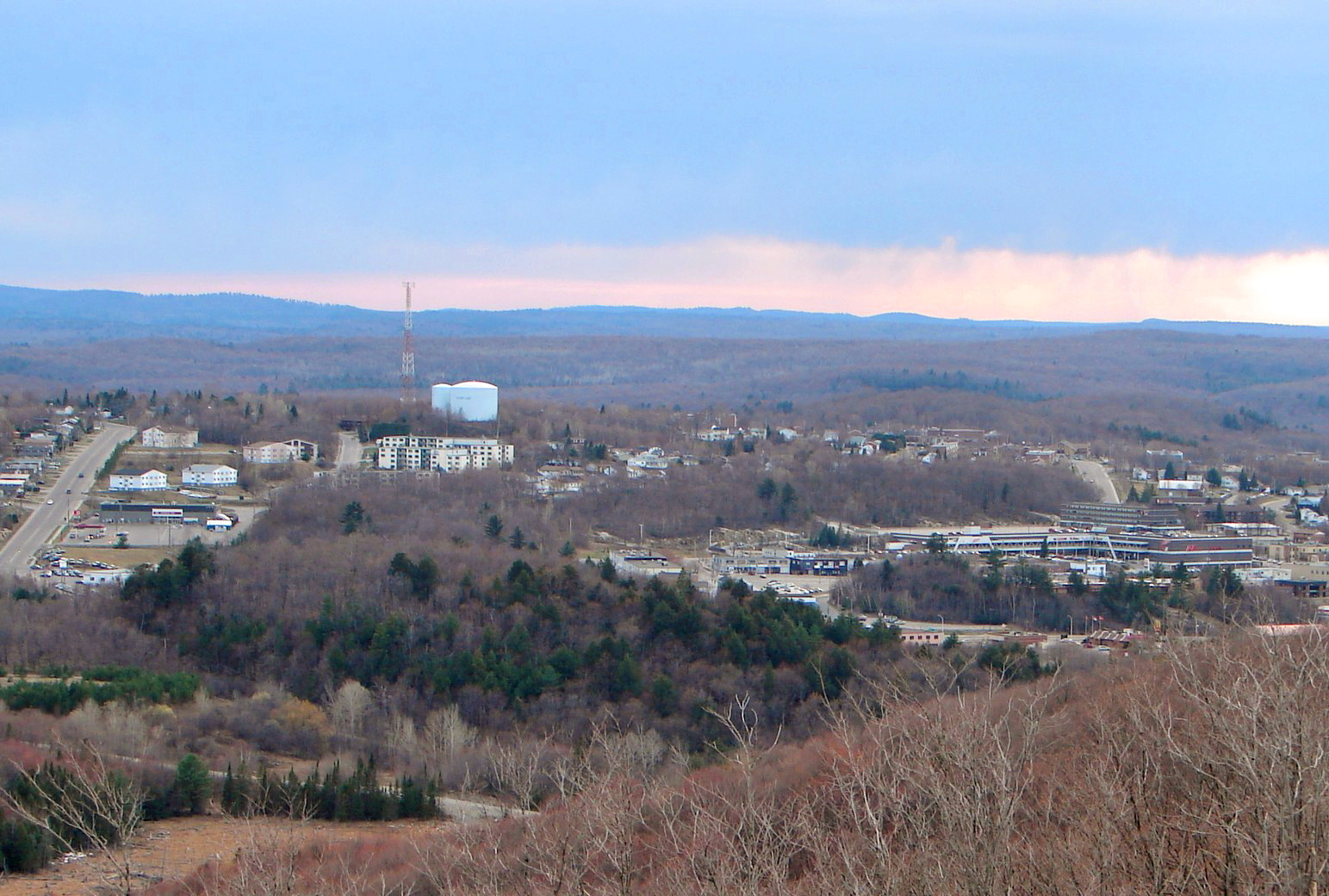 Elliot Lake, Ontario, Canada